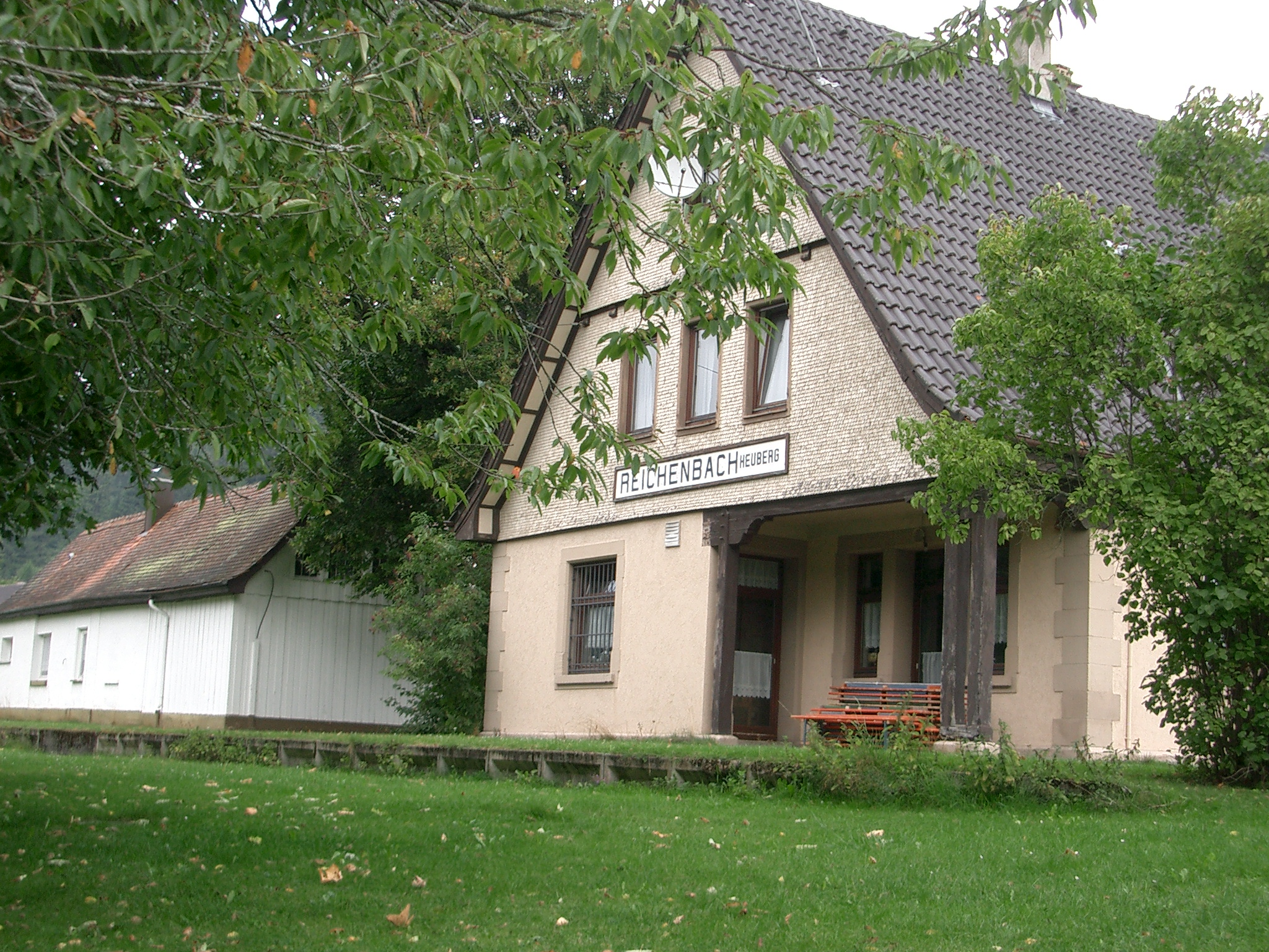 Bahnhof Reichenbach am Heuberg der ehemaligen Heubergbahn von Spaichingen nach Reichenbach im Herbst 2008